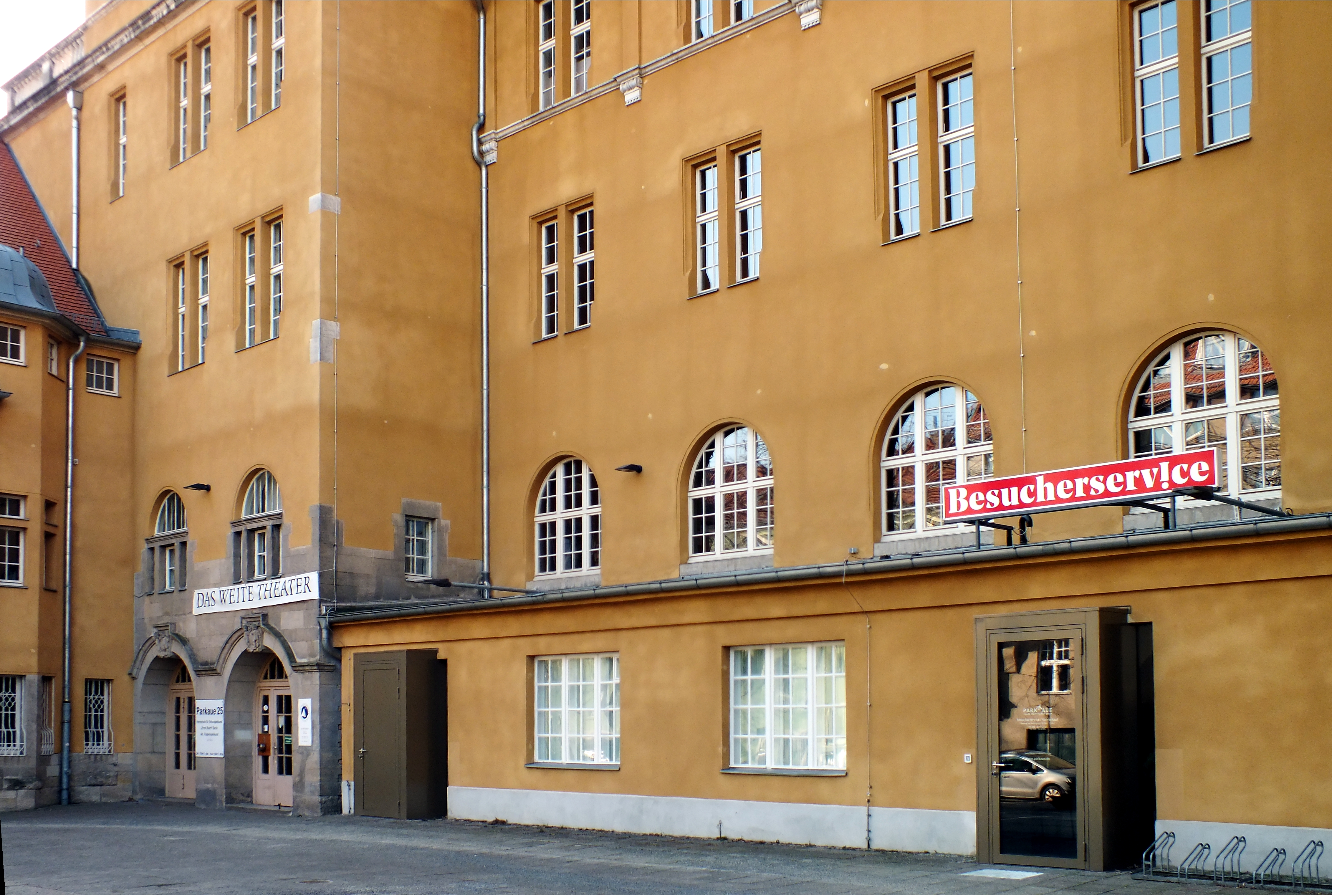 Das Weite Theater, Lichtenberg, Parkaue 25